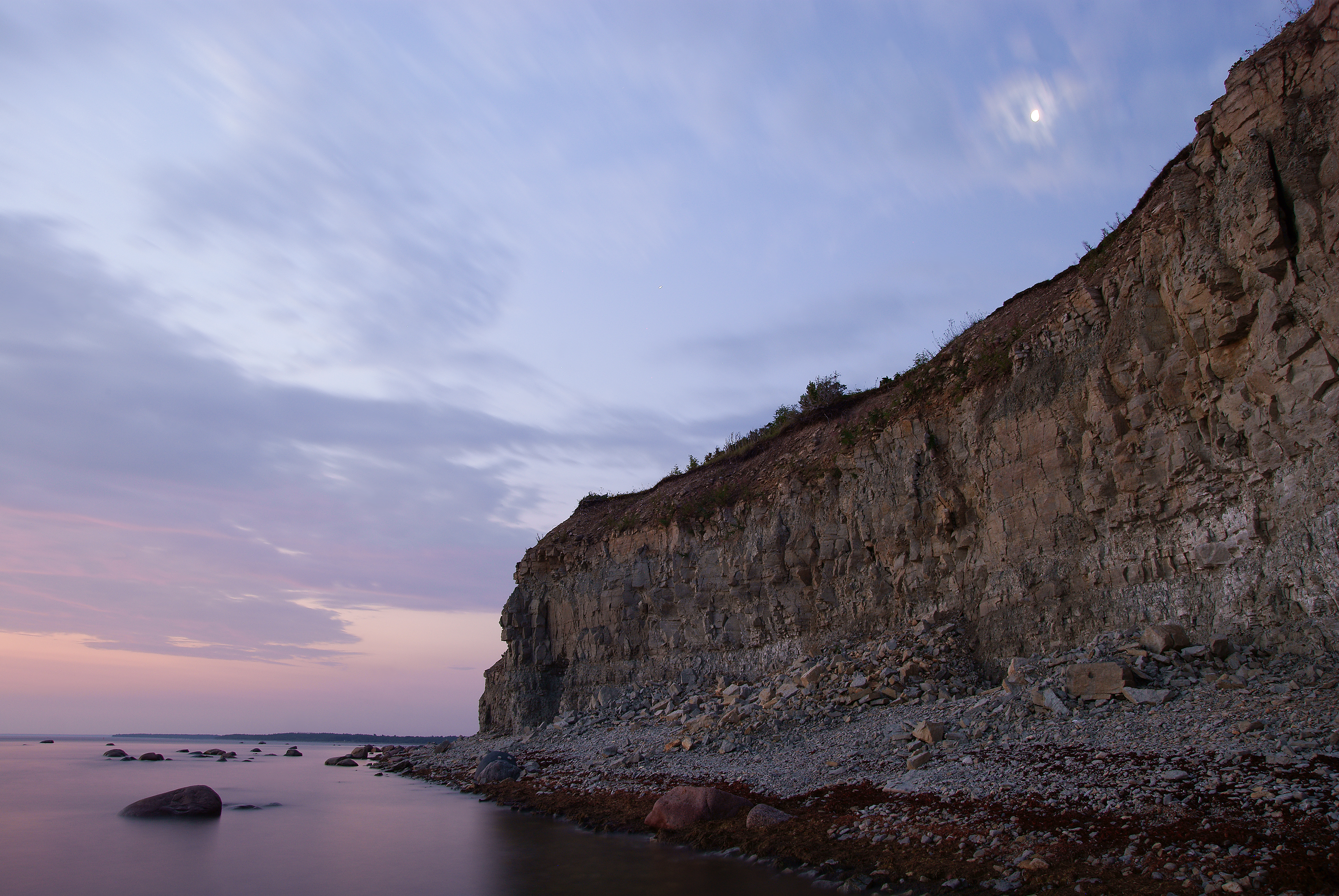 Pildistatud Panga panka suvel koidu ajal. Pildil on panga idapoolsem ots.